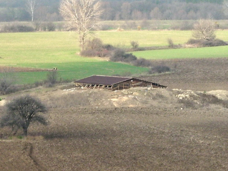 Тракийската гробница при село Гагово, Поповско с построения над нея навес - есента на 2009 г.